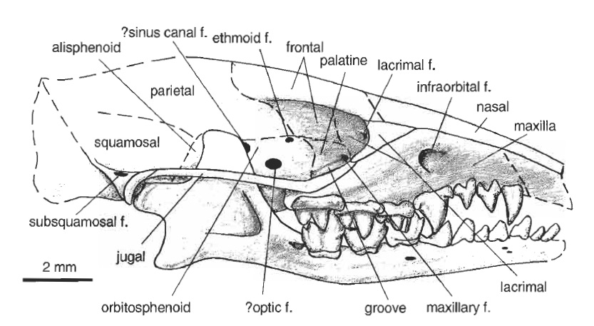 Tentative reconstruction of the skull of Daulestes (Uchkudukodon) nessovi sp.n . (ZIN C.79066) in lateral view.